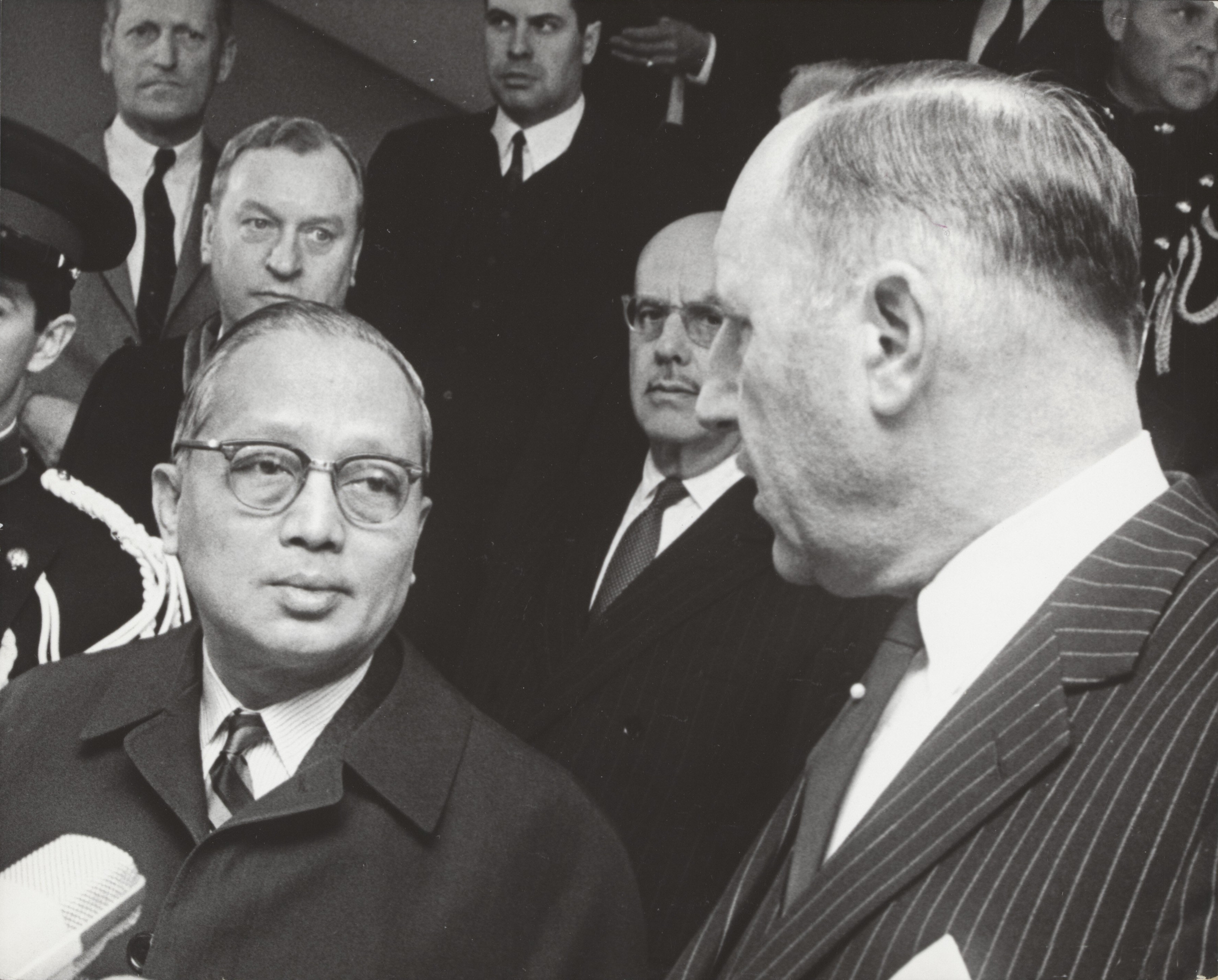 Collectie / Archief : Fotocollectie Elsevier Reportage / Serie : [ onbekend ] Beschrijving : aankomsten, ministers, internationale organisaties, Luns, J.A.M.H., Thant, Oe Datum : 7 april 1968 Locatie : Noord-Holland, Schiphol Trefwoorden : aankomsten, internationale organisaties, ministers Persoonsnaam : Luns, J.A.M.H., Luns, Joseph, Thant, Oe Fotograaf : Koch, Eric / Anefo Auteursrechthebbende : Nationaal Archief Materiaalsoort : Foto (zwart/wit) Nummer archiefinventaris : bekijk toegang 2.24.05.02 Bestanddeelnummer : 090-1040